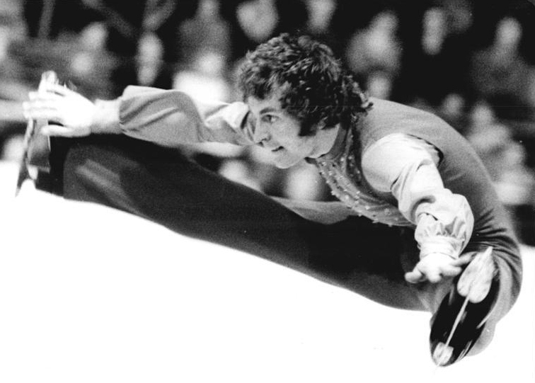 Toller Cranston ADN-ZB Mittelstädt 24.3.74 Berlin: Eiskunstlauf-Weltklasse gefeiert. Toller Cranston (Kanada) faszinierte das Publikum in der Eishalle des Sportforums mit seiner künsterlischen Ausstrahlungskraft, die ihn als besten Kürläufer der Eiskunstlauf-Weltmeisterschaft 74 auszeichnete. 21 Läuferinnen und Läufer aus sechs Ländern waren bei dem großartigen Schaulaufprogramm dabei.